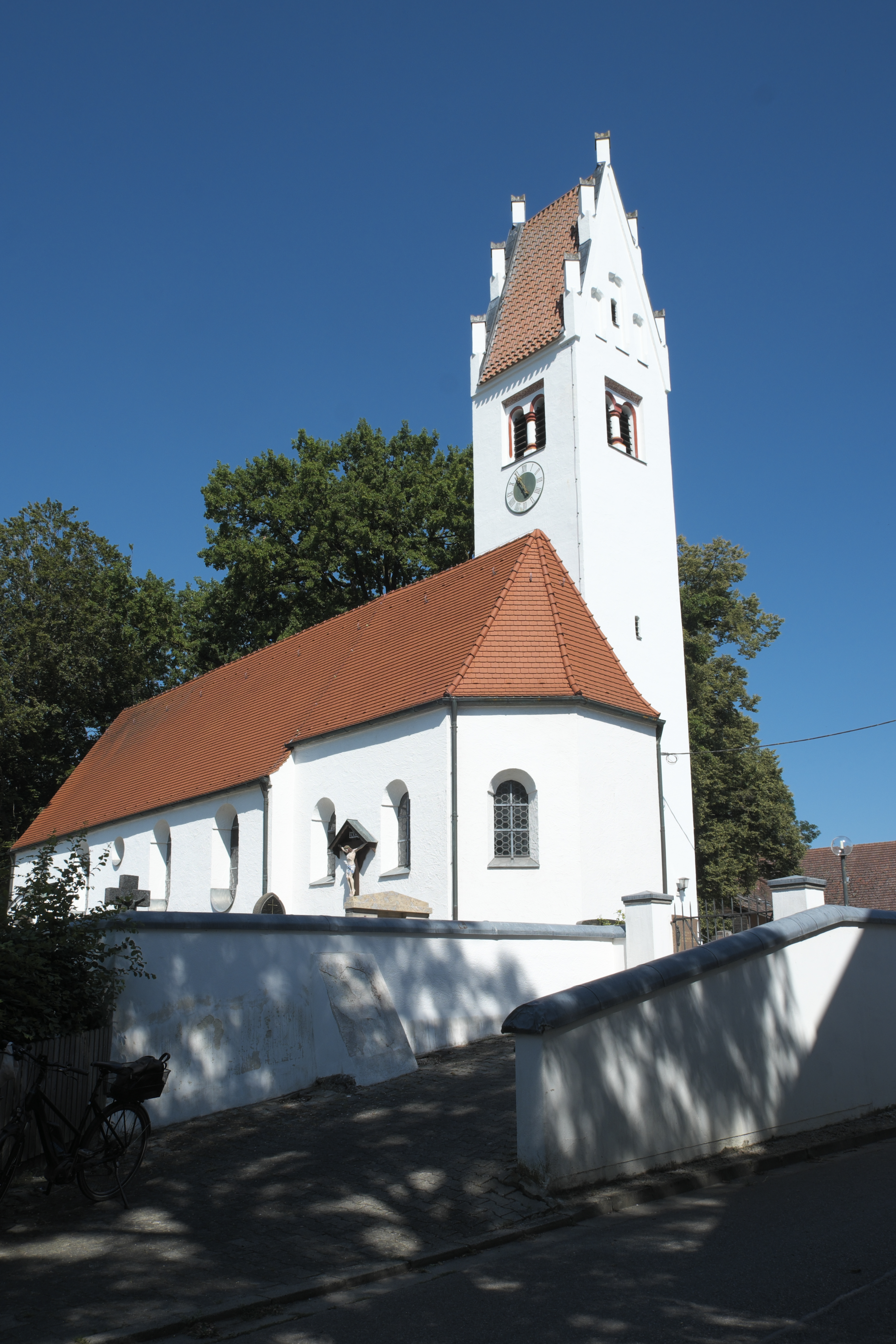 Katholische Pfarrkirche St. Michael in Wenigmünchen (Egenhofen) im oberbayerischen Landkreis Fürstenfeldbruck (Bayern/Deutschland)